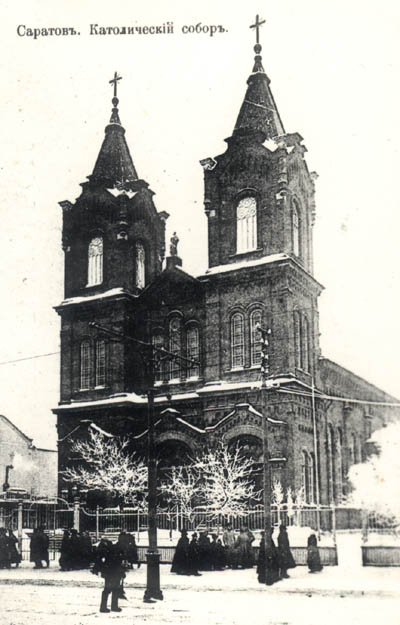 Саратов. Католический собор